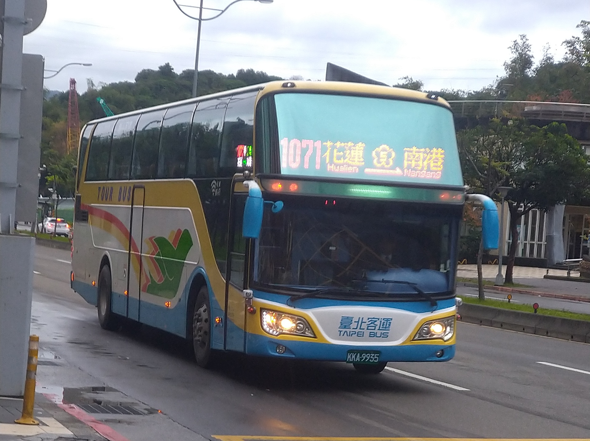 中文（台灣）: 臺北客運1071線用車KKA-9935，前彰化通運遊覽車，於臺北市南港轉運站拍攝